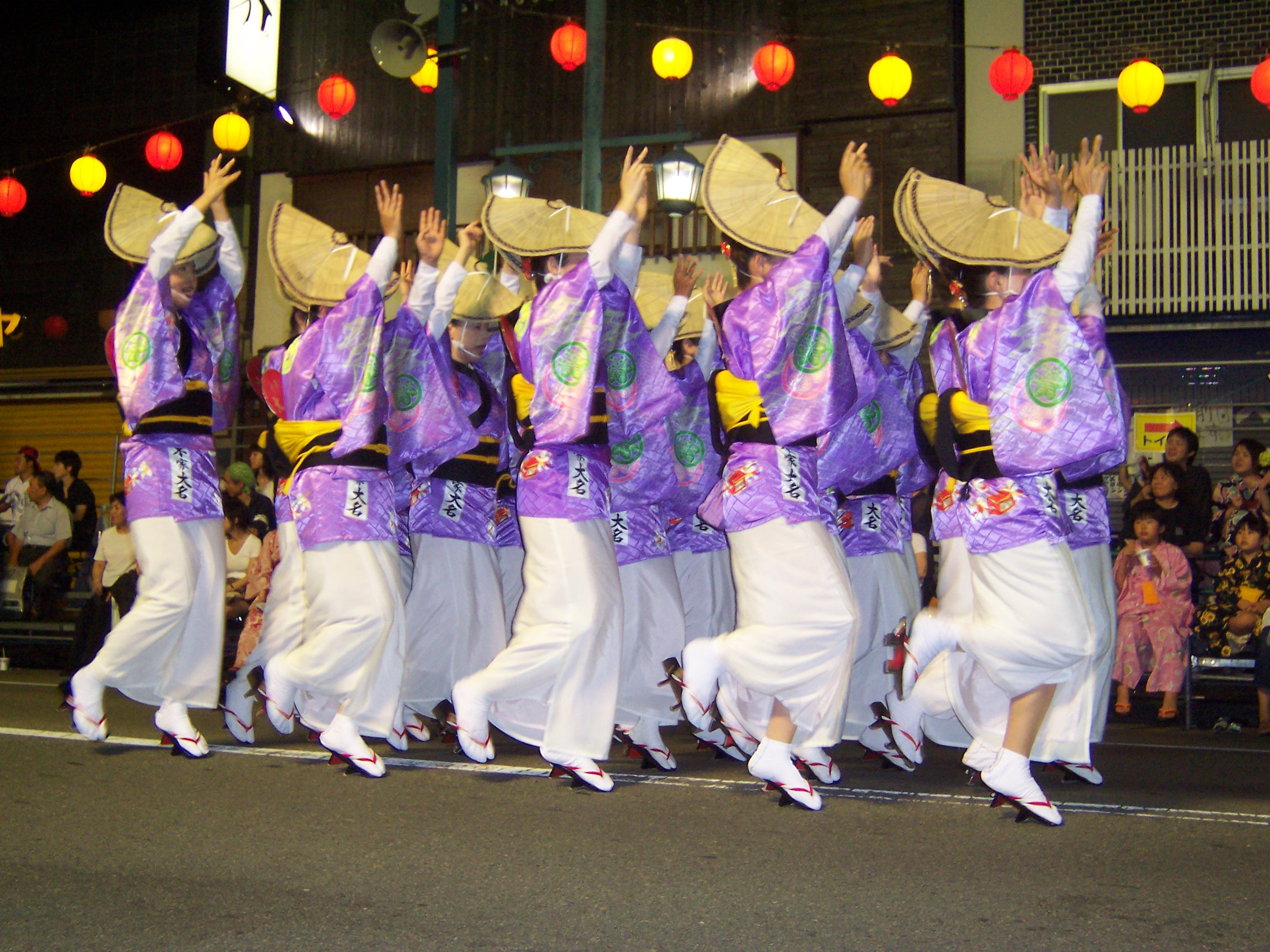 Danseuses du Awa-Odori 2007